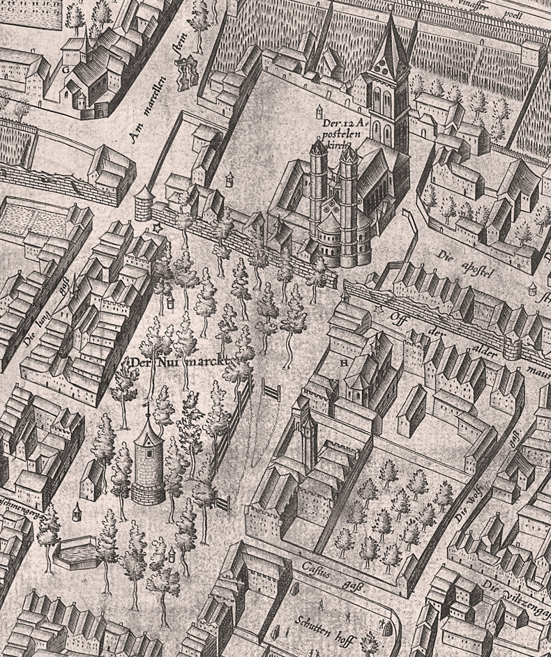 Ausschnitt eines Stadtplanes mit St. Aposteln (Köln) und Neumarkt